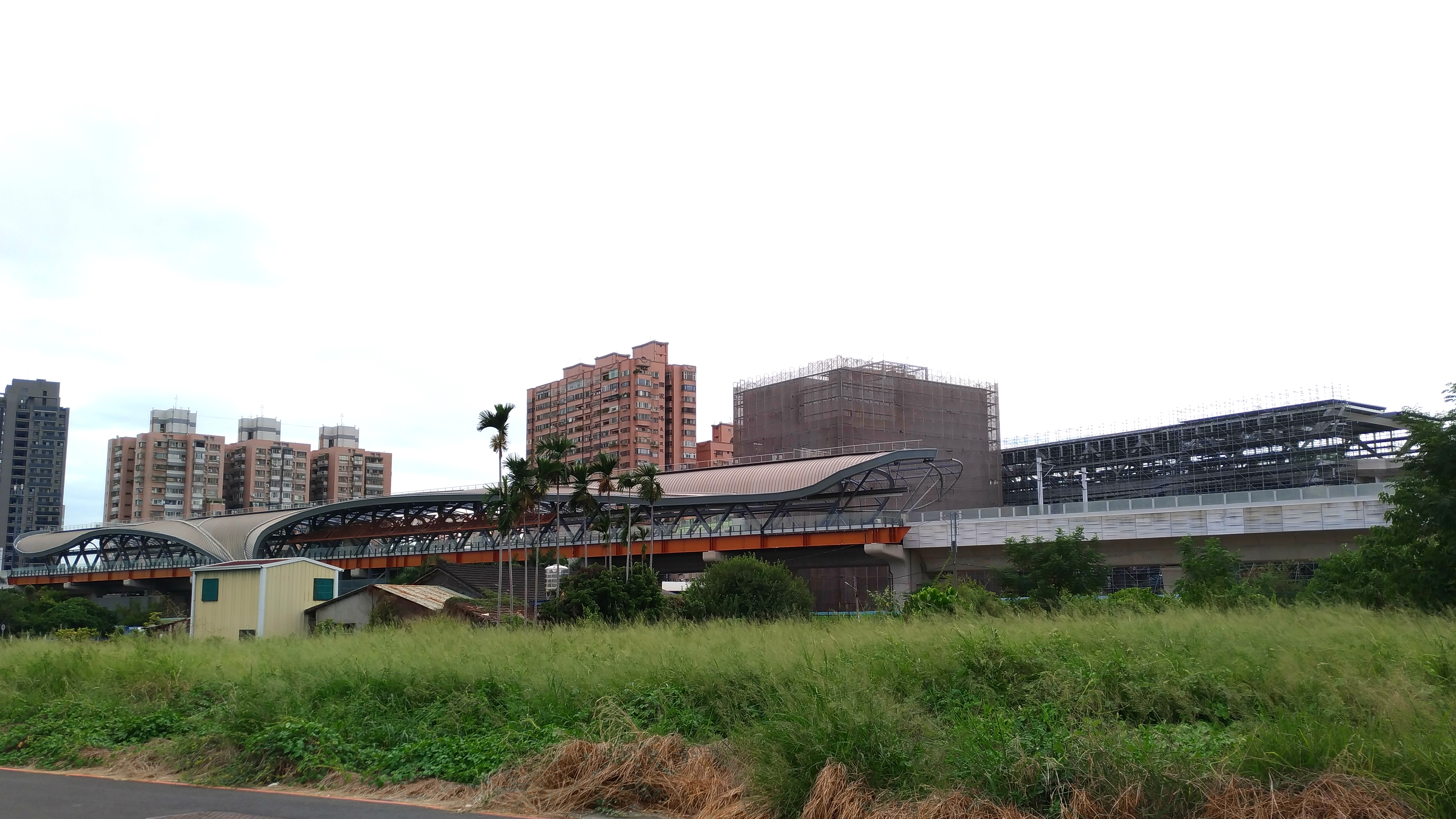 中文（台灣）: 松竹車站2017年10月工程，後方為台中捷運G4站工程